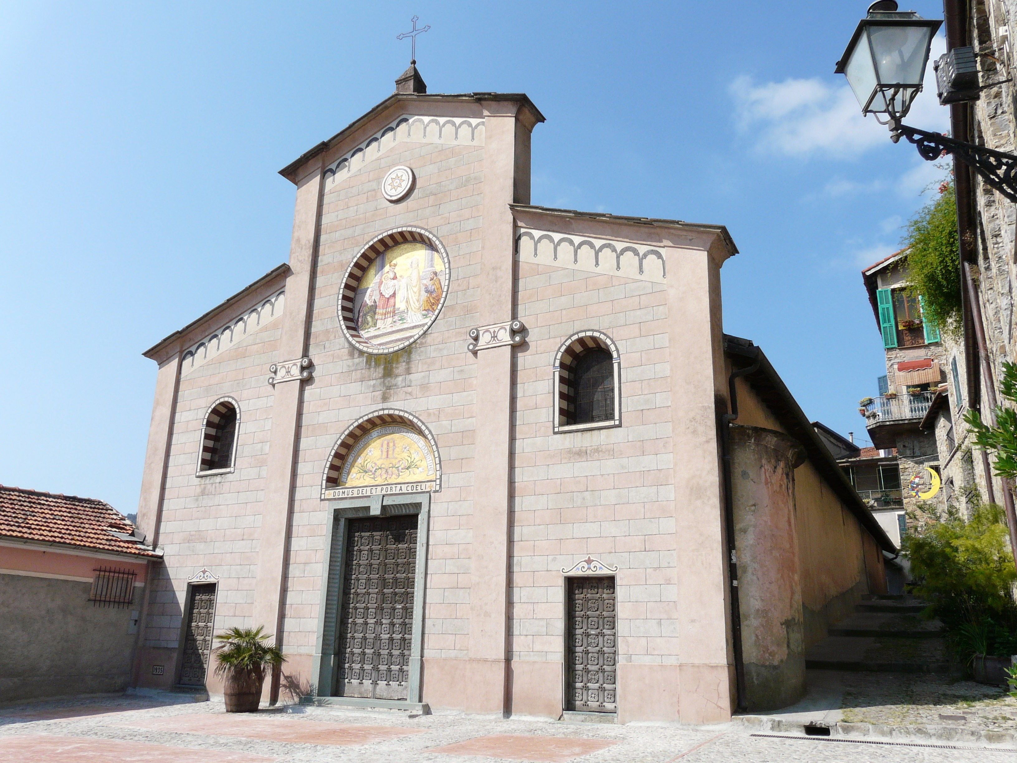 Chiesa della Purificazione di Maria, Apricale, Liguria, Italia